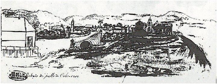 Dibujo de como se veía el centro de Cabo Rojo en 1830.